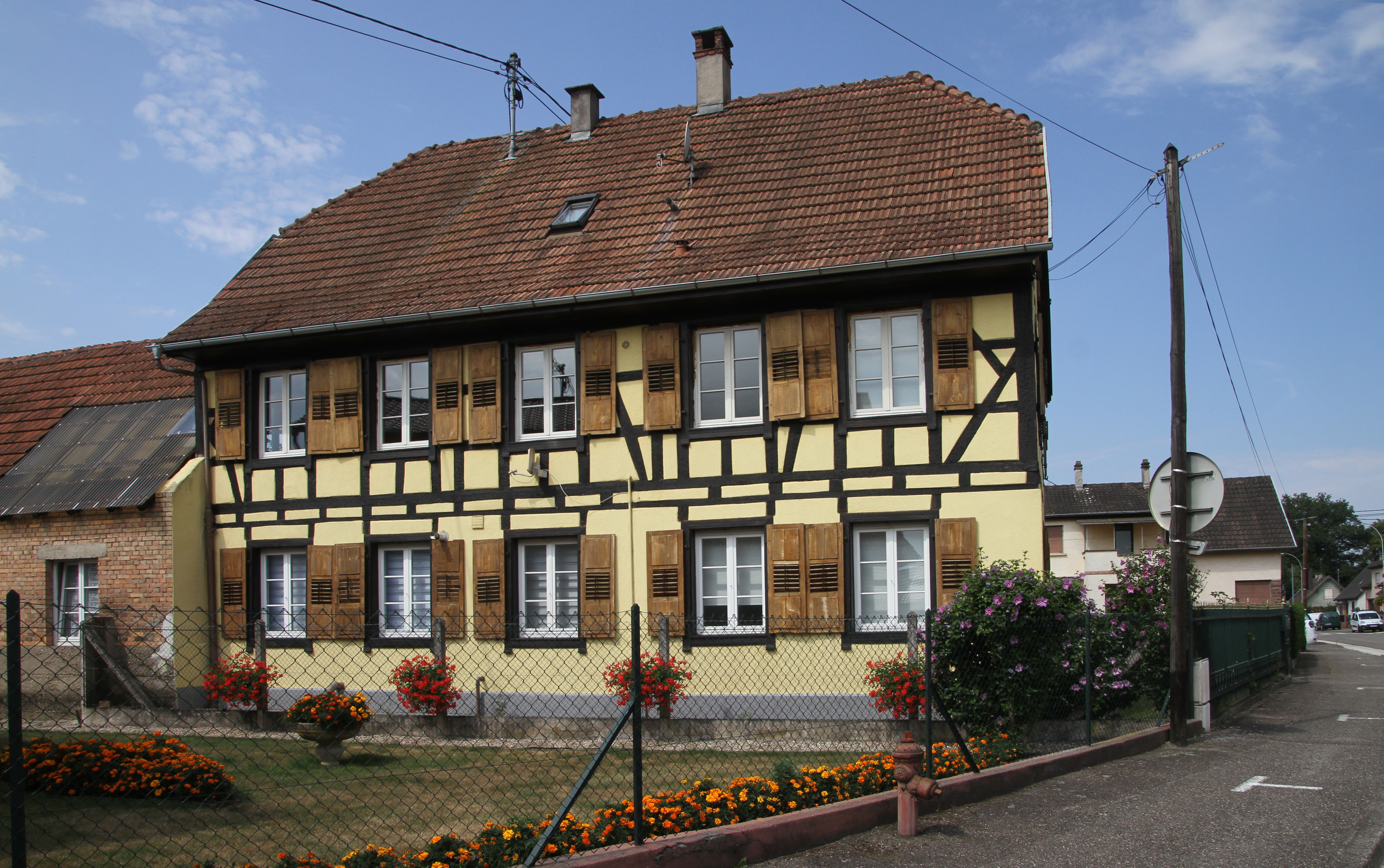 Soufflenheim